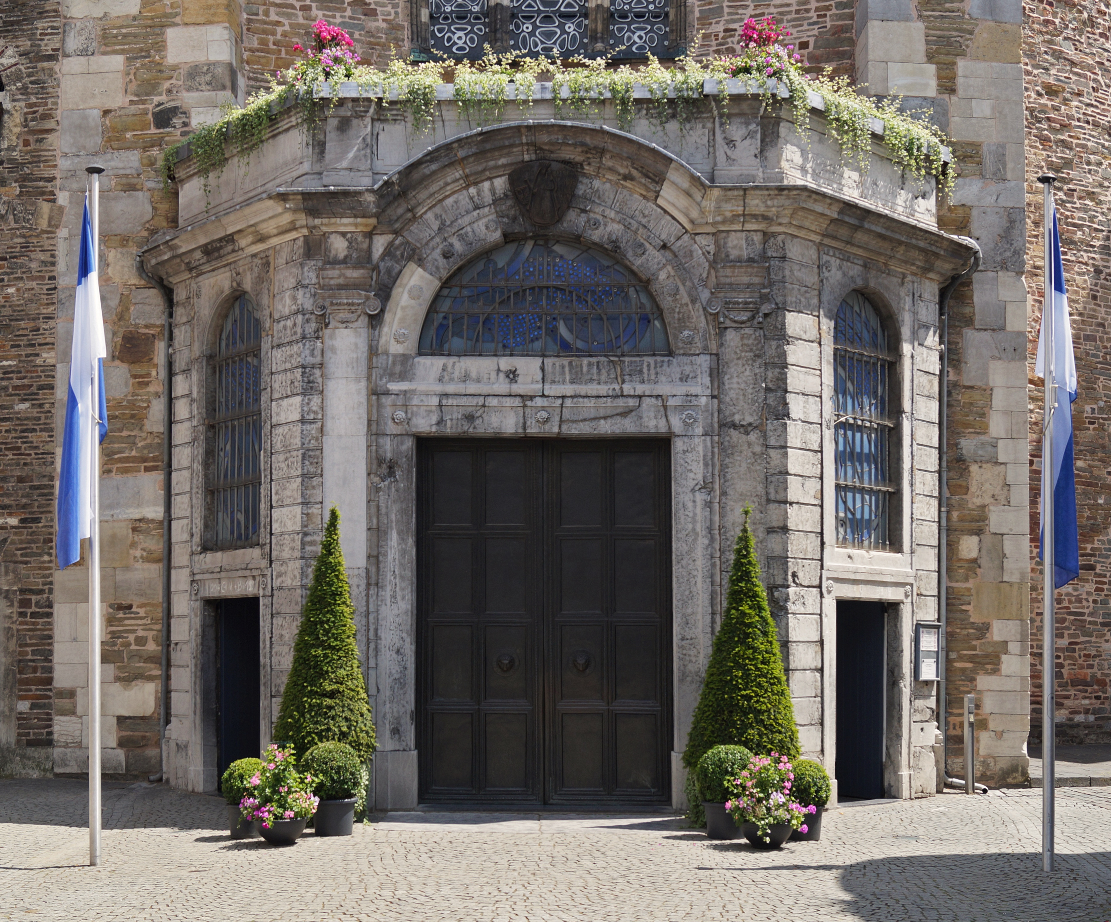 Aachener Dom barockes Eingangsportal